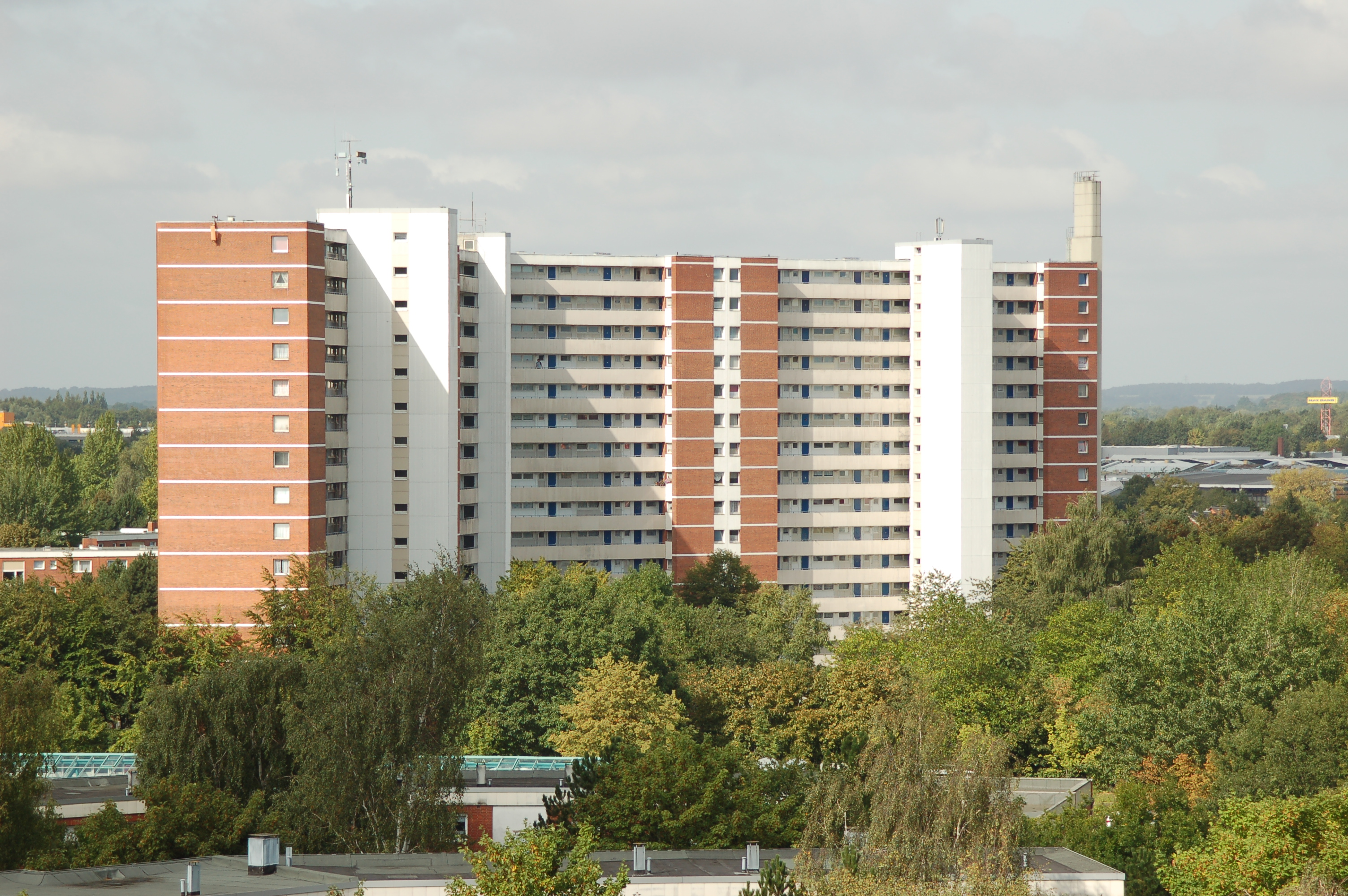 Karavellenstr 1-5